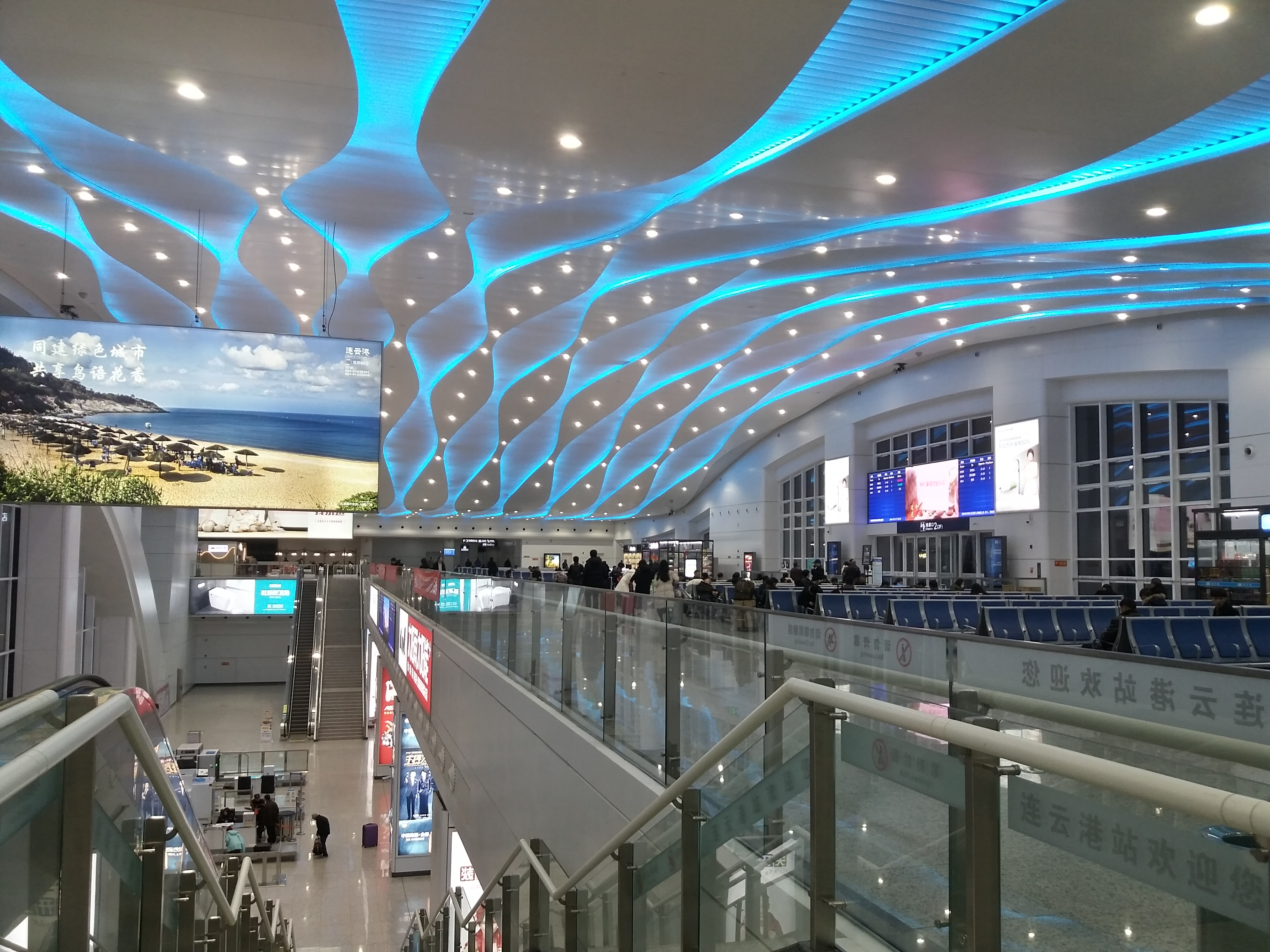 Inside Lianyungang Railway Station